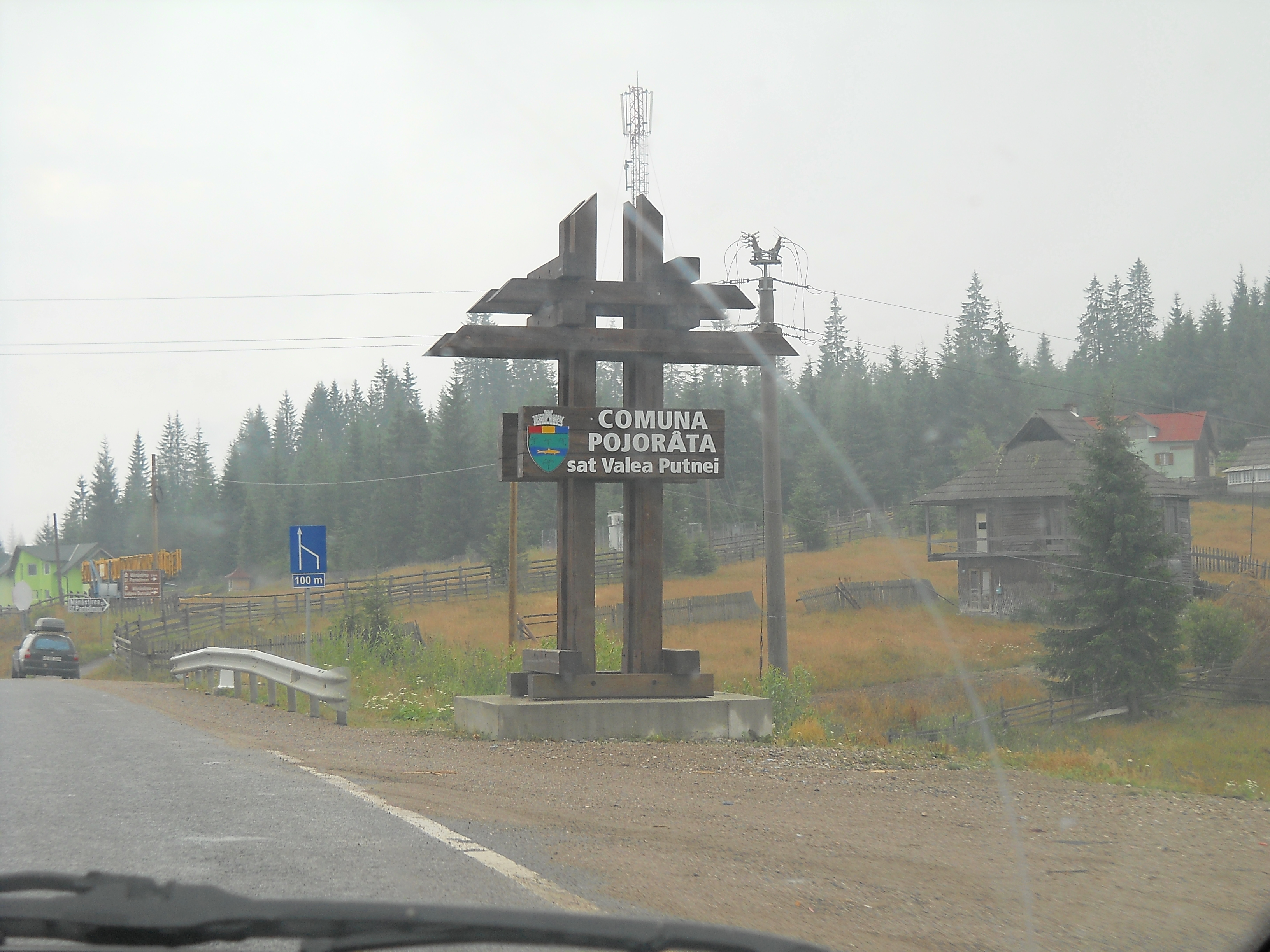 Indicator la intrare în Valea Putnei, Pojorâta, judeţul Suceava